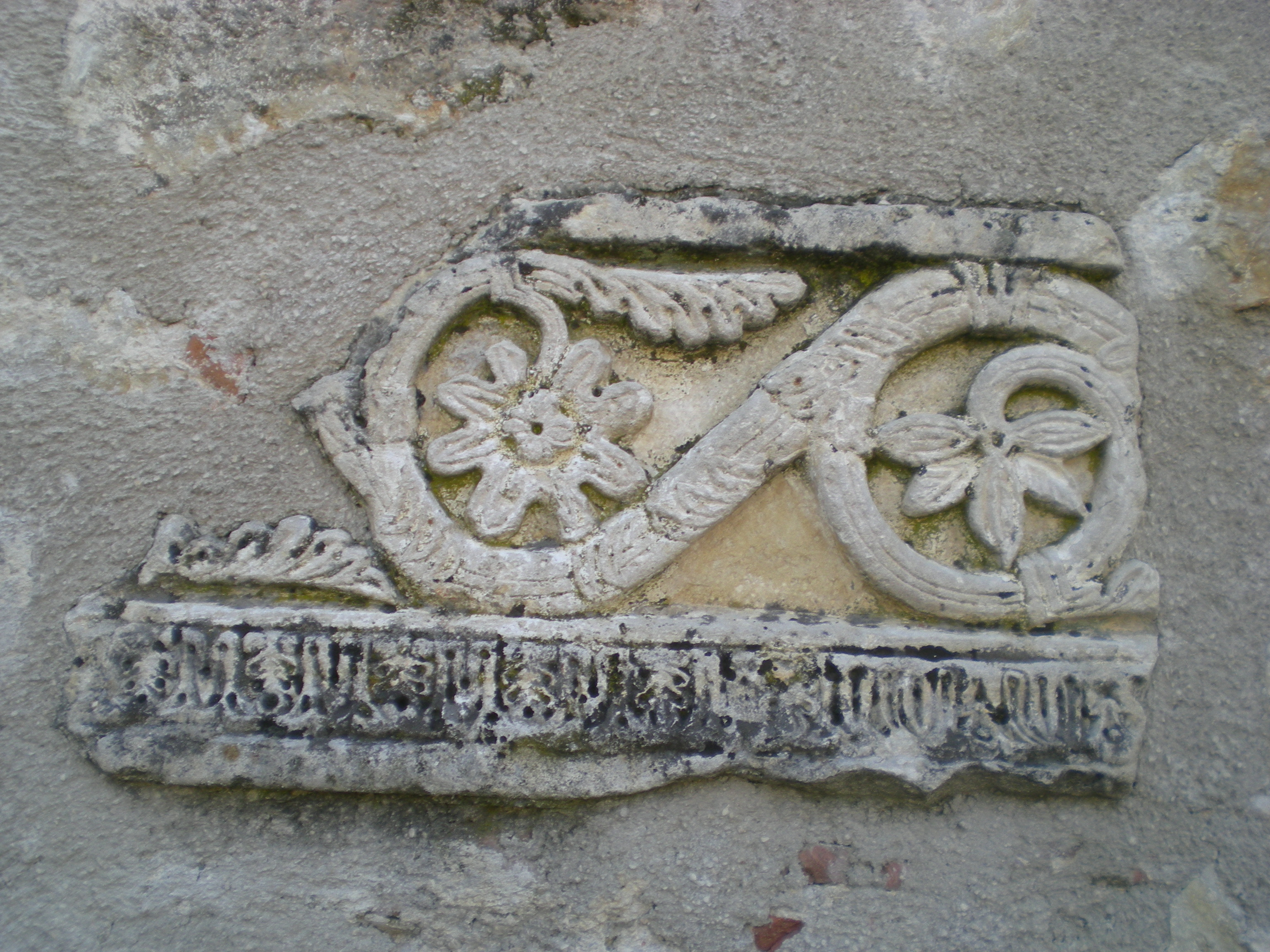 Chiesa di San Michele Arcangelo a San Vittorino (L'Aquila): dettaglio sui resti del paramento altomedievale